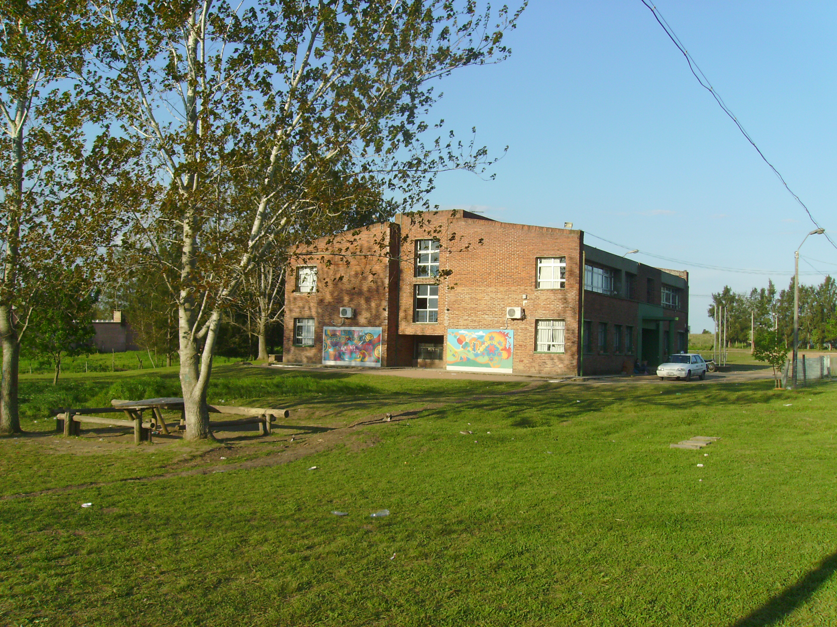 Fotografía sacada el jueves 10 de octubre de 2013